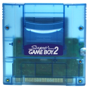 スーパーゲームボーイ2本体 撮影日2004/11/22 撮影者Muband